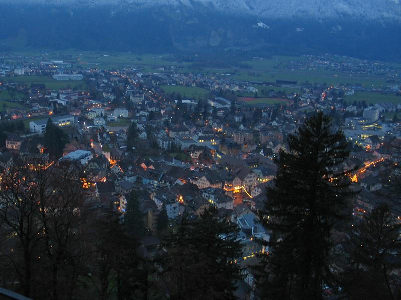 Altdorf, Uri at nightfall